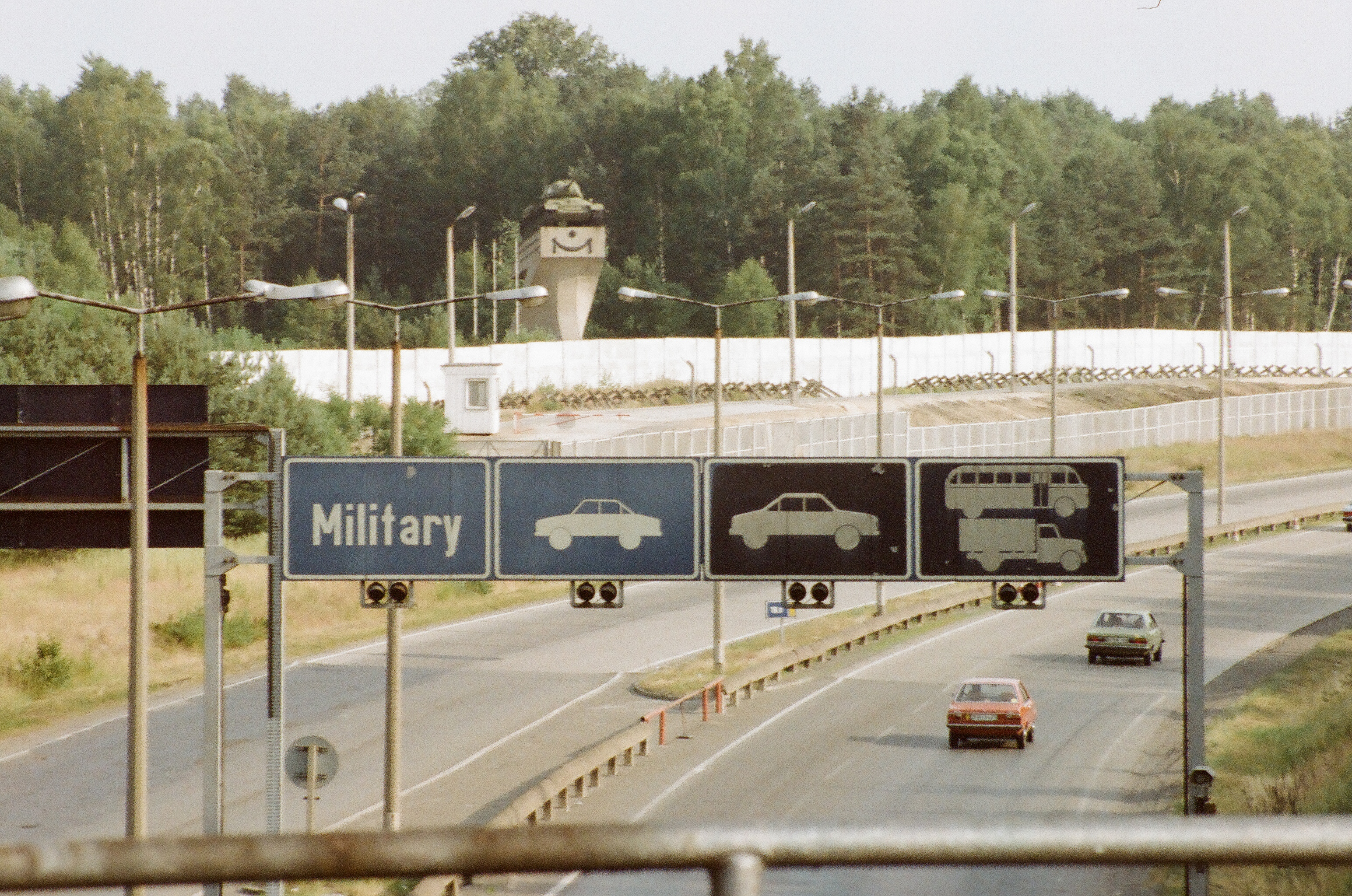 Grenzübergang Checkpoint Bravo / Berlin Dreilinden